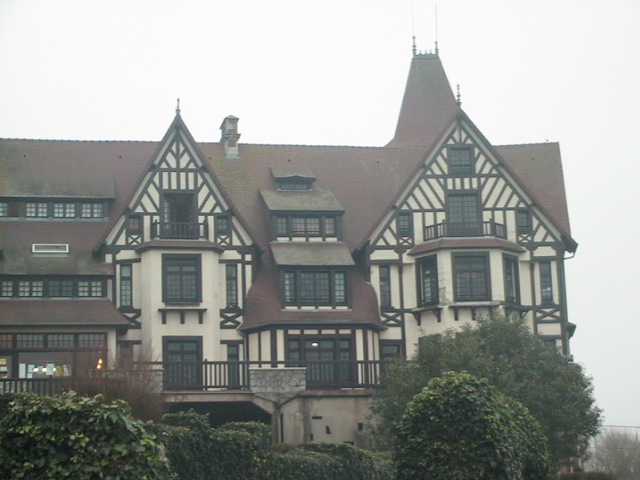 Manoir du lycée Saint-Adjutor de Vernon (27) - 54, rue de Marzelles. Concepteur : Georges Thomine.